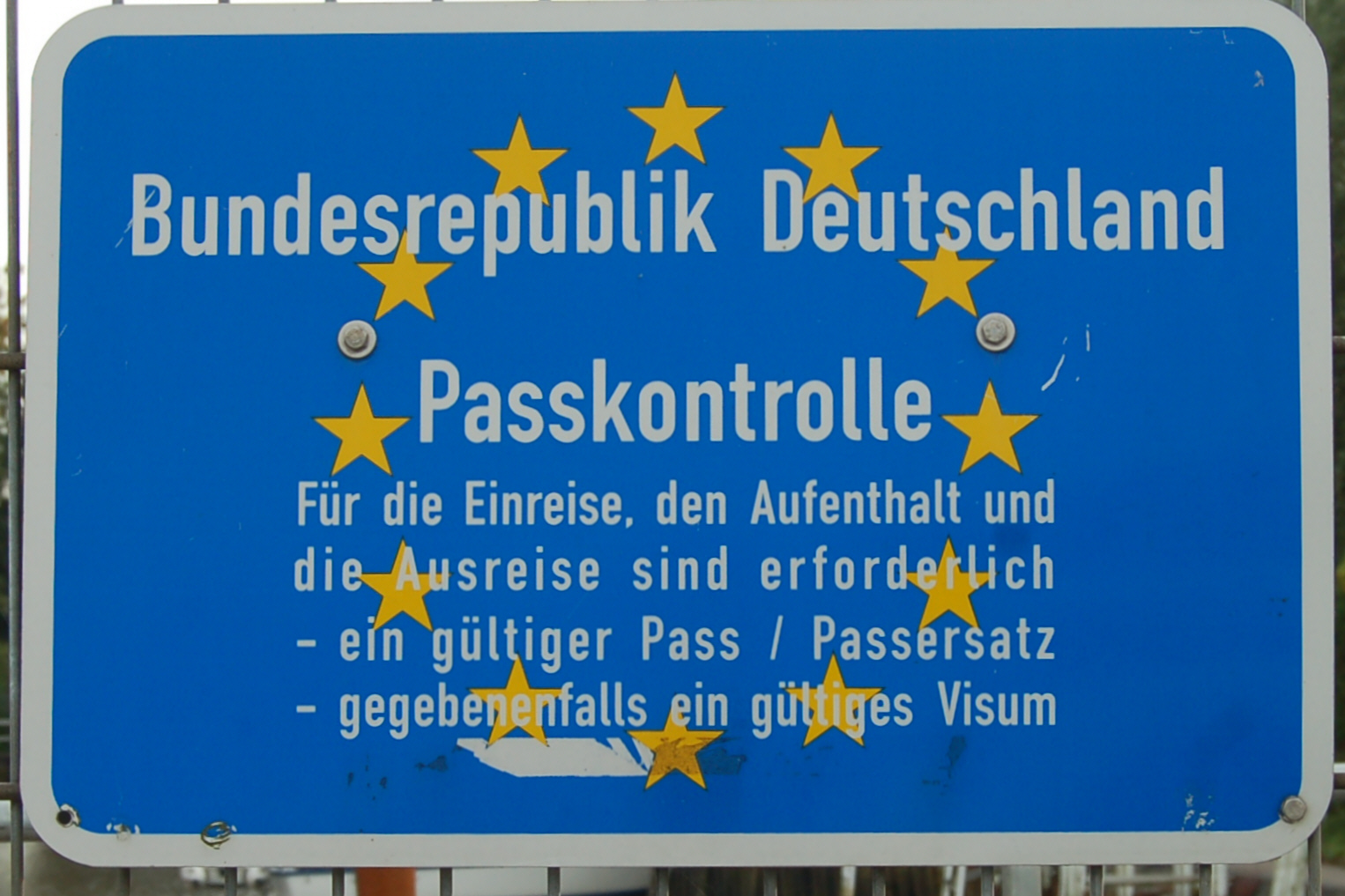 Schild "Passkontrolle" im Uetersener Stichhafen an der Pinnau.